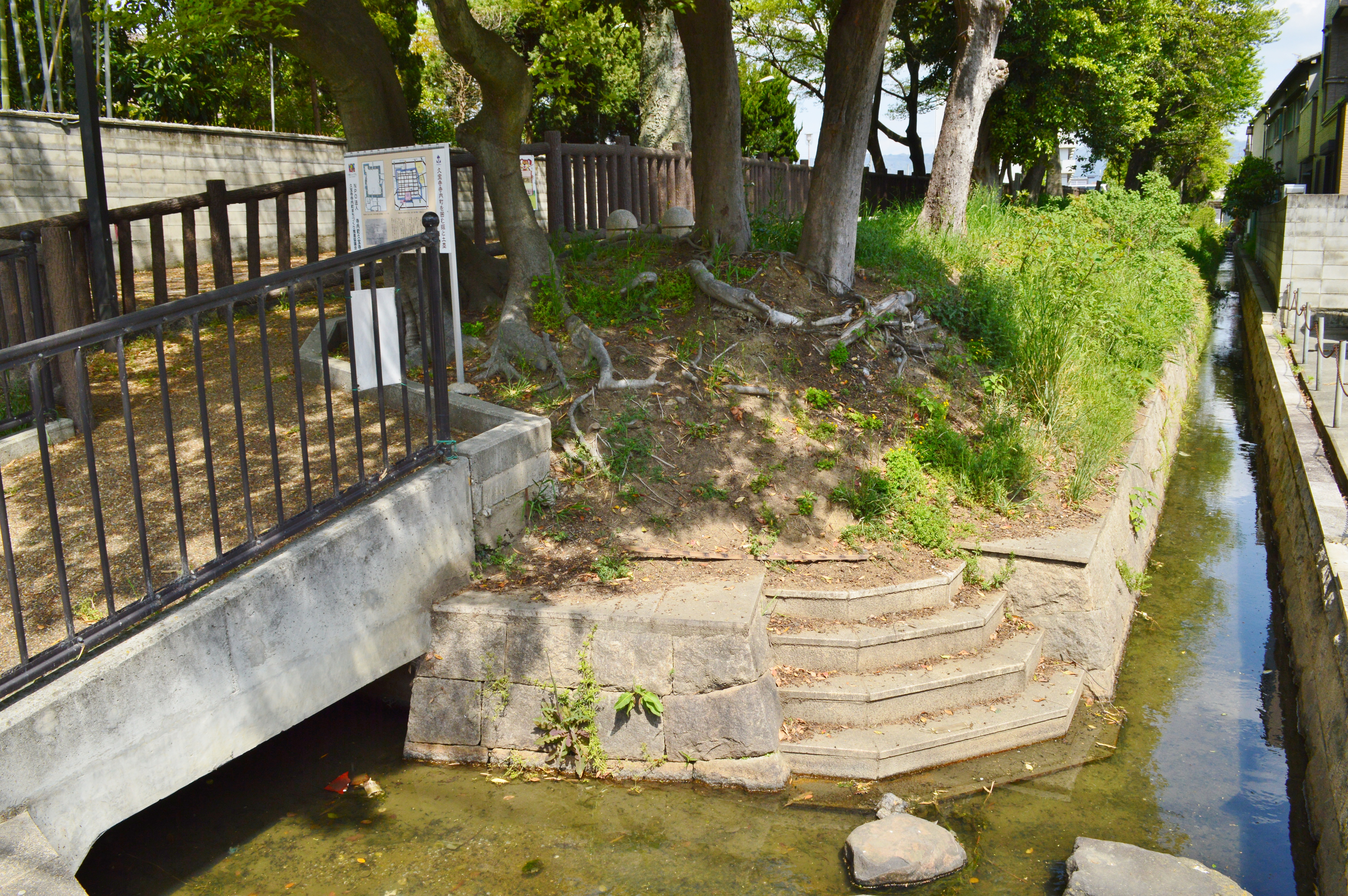 久宝寺寺内町 土塁跡